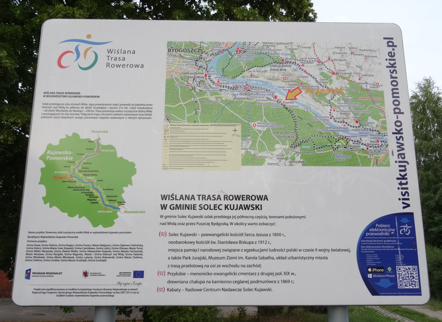 Przyłubie, gmina Solec Kujawski, powiat bydgoski